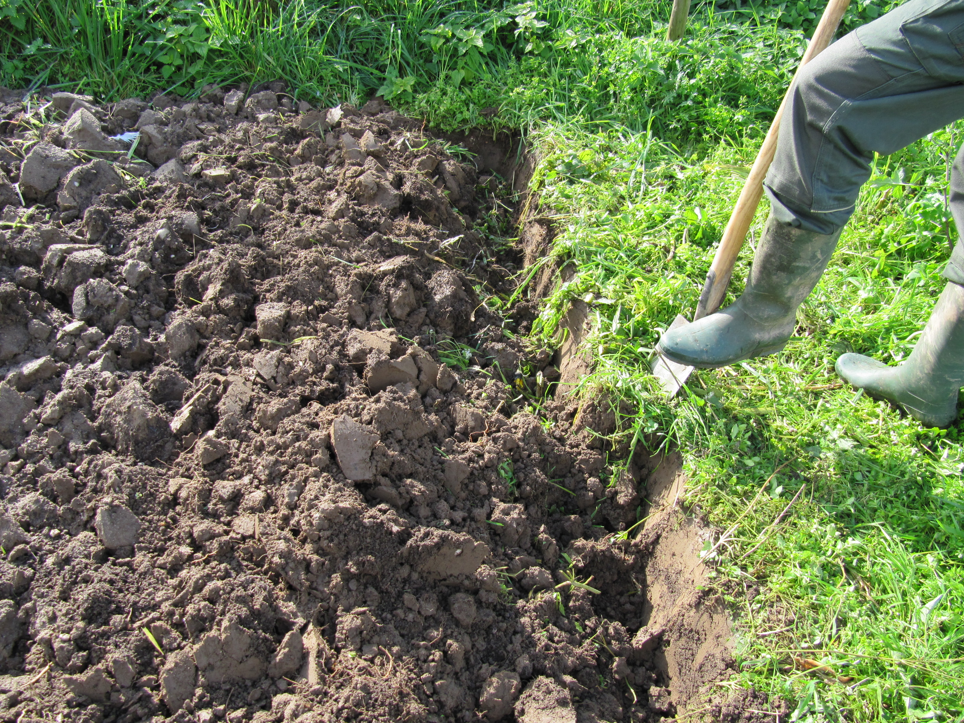 Grabearbeit mit dem Spaten, Bild 2: Nach dem seitlichen Vorstechen wird der Spaten parallel zur Furche bis zur Blattoberkante, ggfls. unter Zuhilfenahme des Fußes, eingestochen.